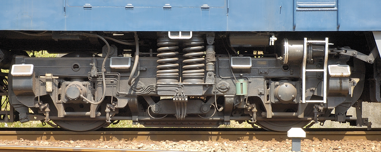 日本国有鉄道（国鉄）→ 東日本旅客鉄道（JR東日本）所属 EF63形電気機関車 (EF63 11) のDT125形台車